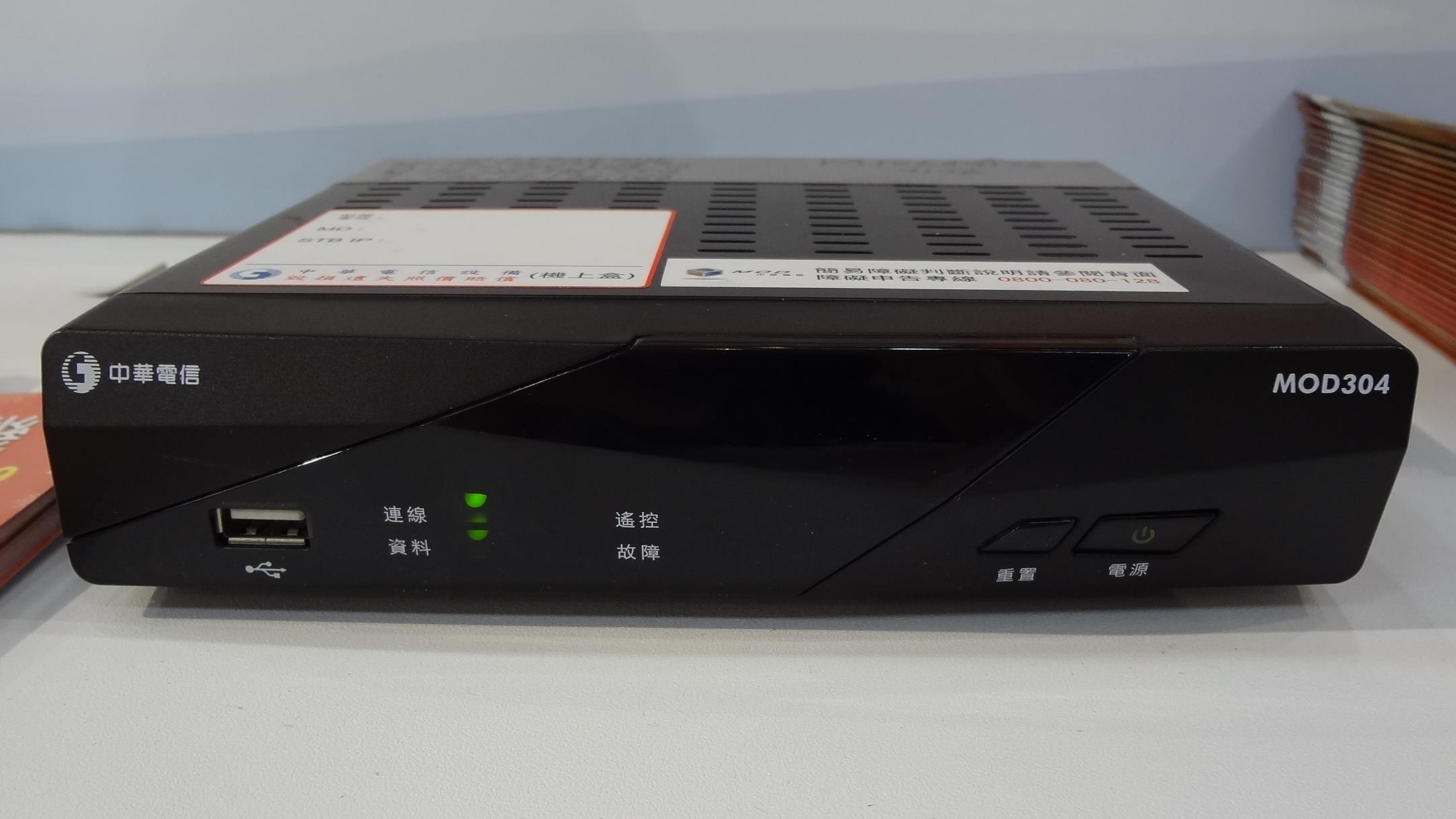 2013年資訊月，中華電信攤位展示的中華電信MOD機上盒MOD304。